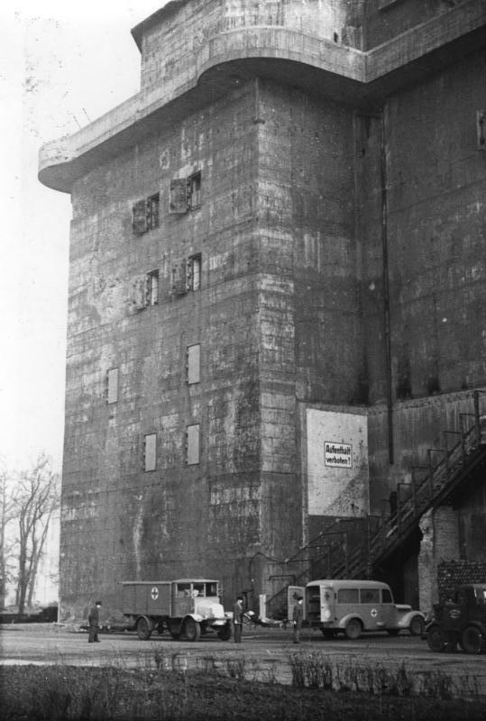 Berlin-Tiergarten, Flakturm als Krankenhaus Illus-E.O.Krueger Seuchenbekämpfung in Berlin. 1946 Der Zoo-Bunker als Krankenhaus. 226-46 [Einer der Berliner Flaktürme im Tiergarten, der große Zoobunker "Gustav"]